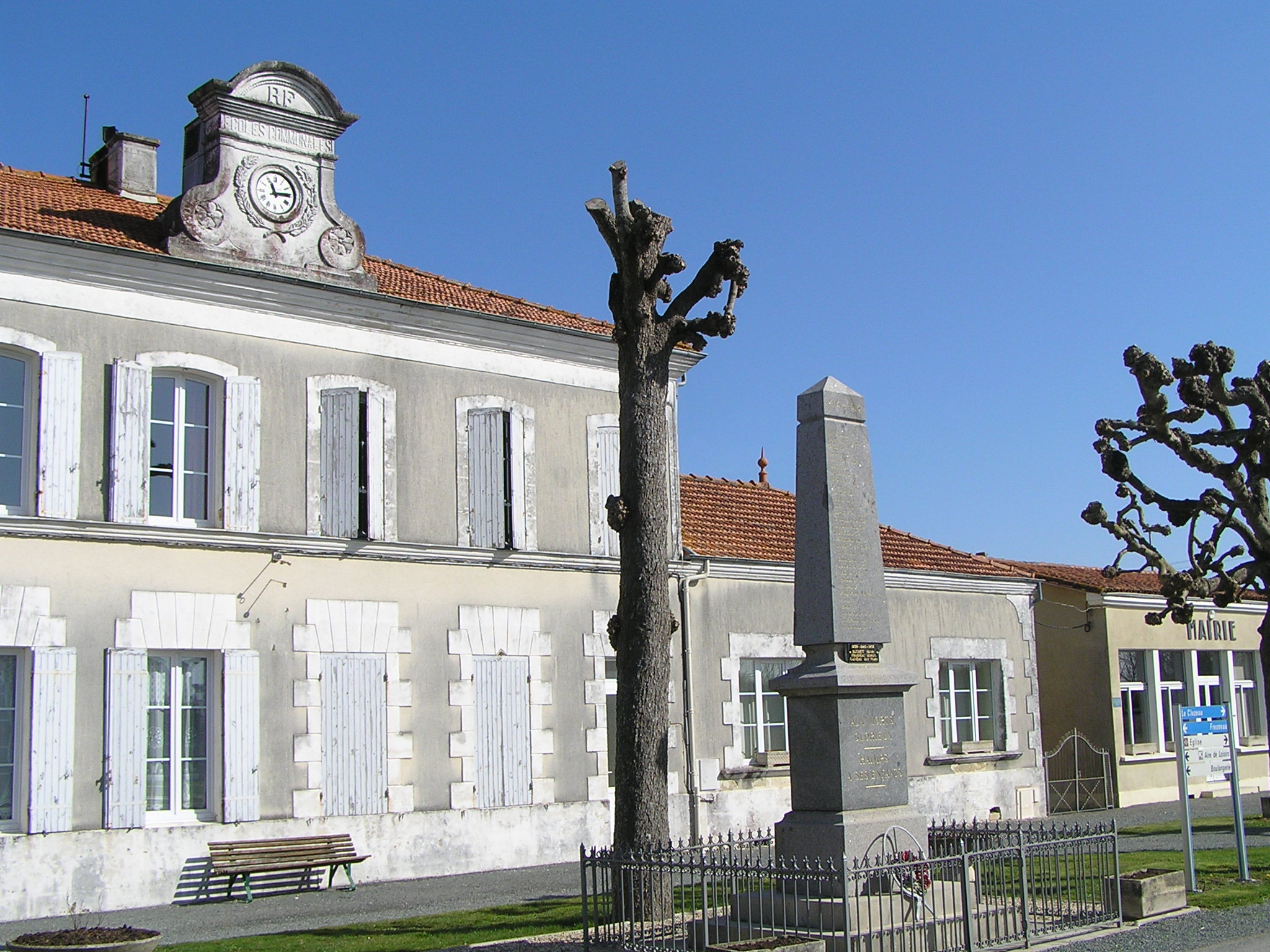 mairie, monument aux morts et ancienne école de Haimps